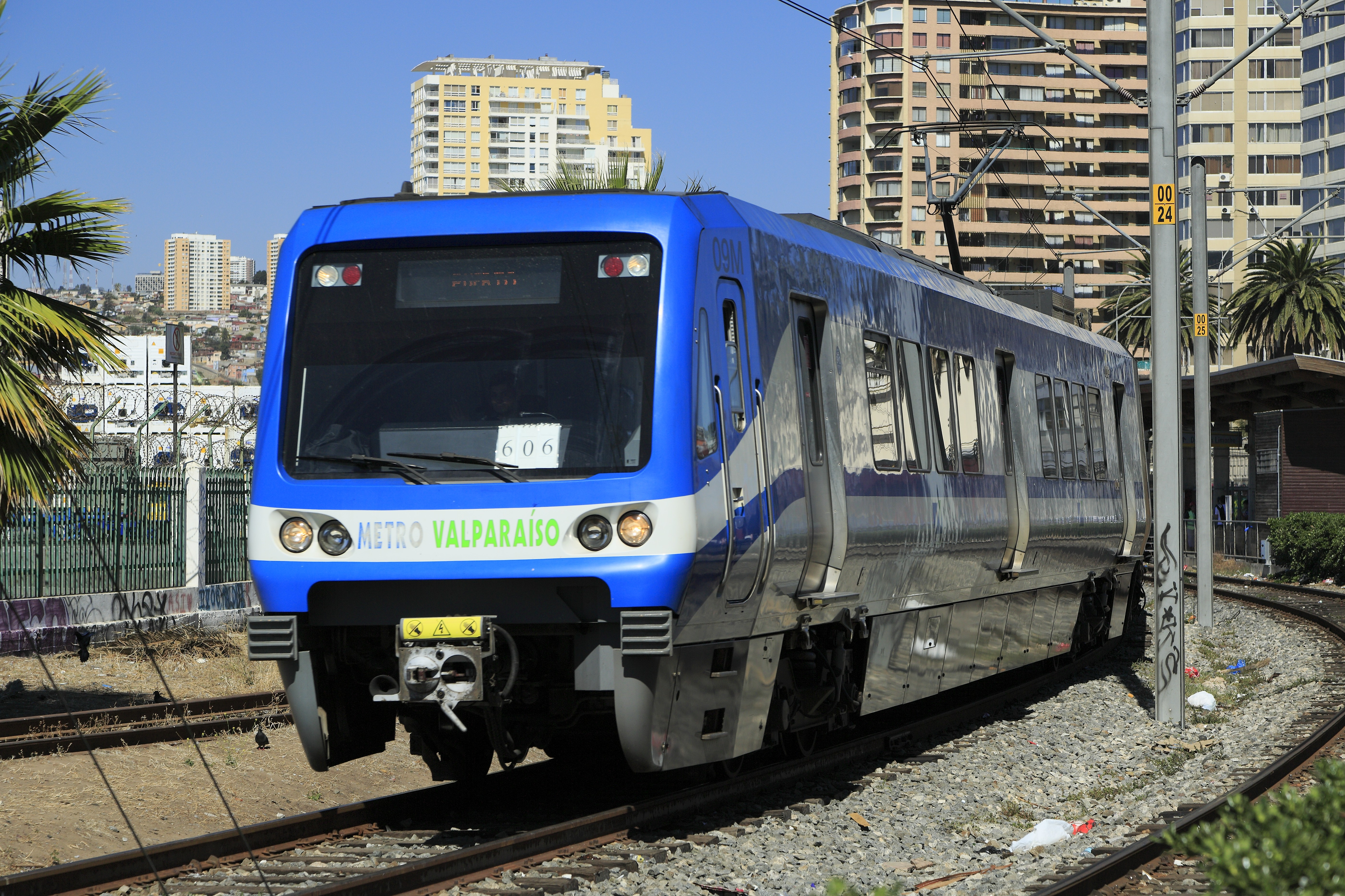 Zug von Limache Richtung Puerto beim Verlassen des Hp Bellavista. Bis zum Endpunkt Puerto sind es nur noch wenige hundert Meter. Sonntags verkehren die Doppeltriebwagen nur einzeln, am Aufnahmetag waren keine Wagen der Nachfolgebauart »X’Trapolis Modular« unterwegs. Die Schienen ganz links gehören nicht zu einem eventuell vorhandenen Hafenanschlussgleis, sie sind nach einem Schienenwechsel nur noch nicht verladen worden.